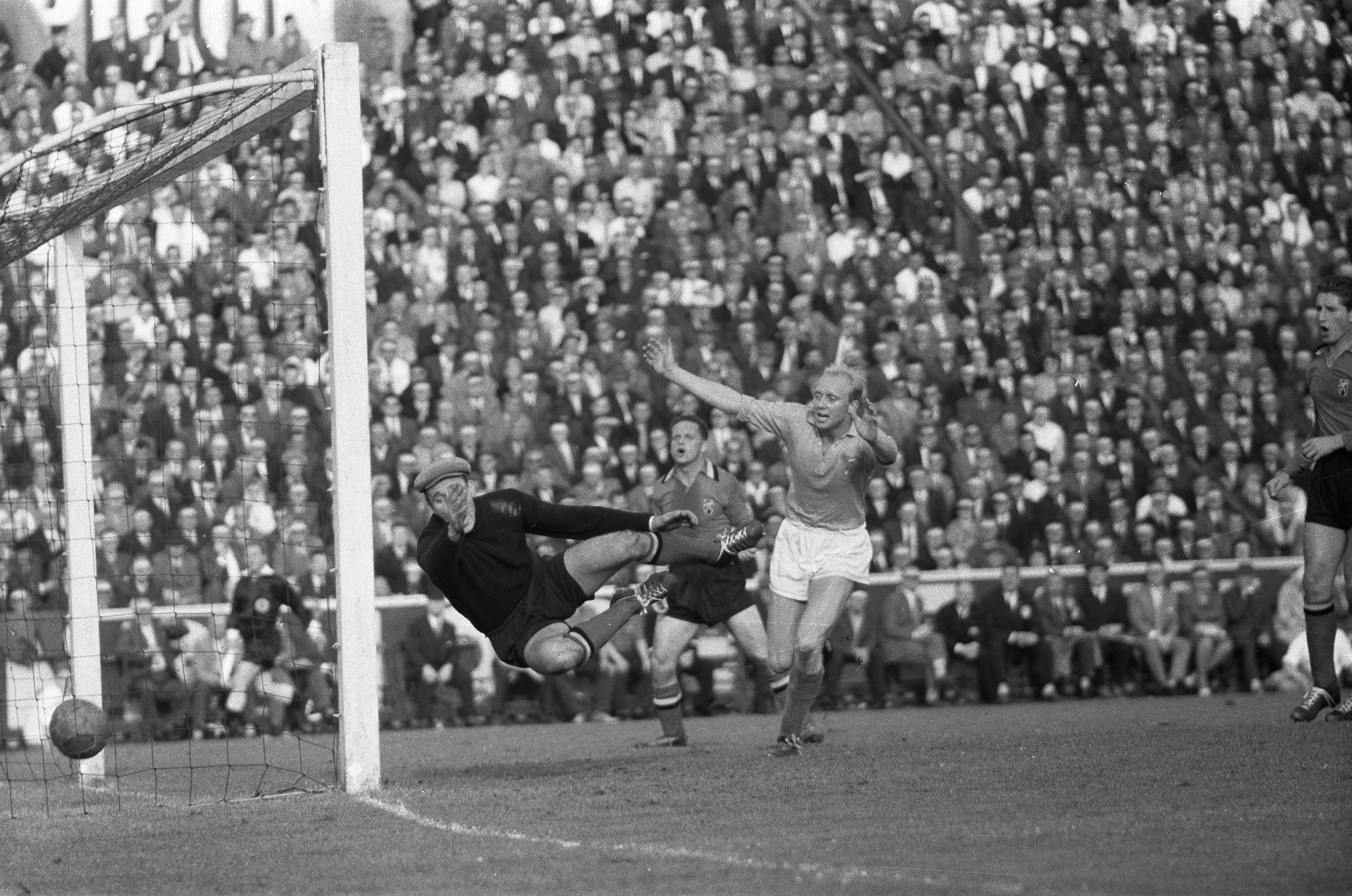 Collectie / Archief : Fotocollectie Anefo Reportage / Serie : [ onbekend ] Beschrijving : Voetbal Belgie tegen Nederland 1-4 te Antwerpen, 1-3, eigen doelpunt van Saeys (België, midden) links doelman Seghers en juichend Piet Kruiver Datum : 2 oktober 1960 Locatie : Antwerpen Trefwoorden : sport, voetbal Persoonsnaam : Kruiver, Piet, Saeys, Charles Instellingsnaam : Nederland Fotograaf : Pot, Harry / Anefo Auteursrechthebbende : Nationaal Archief Materiaalsoort : Negatief (zwart/wit) Nummer archiefinventaris : bekijk toegang 2.24.01.05 Bestanddeelnummer : 911-6402